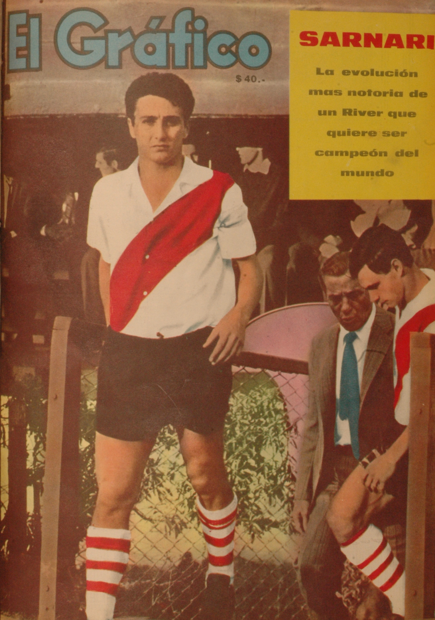 El Grafico del 26 de Abril de 1966. Edicion 2429